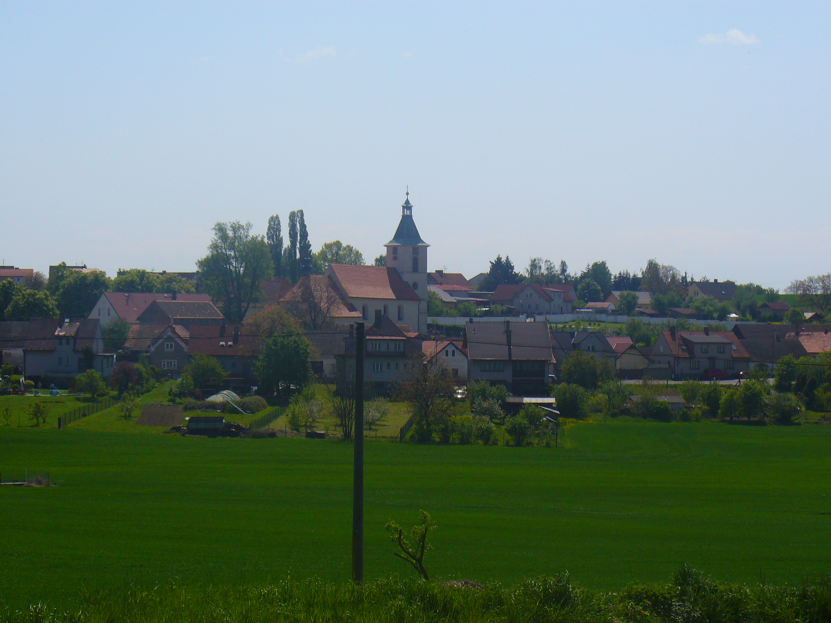 Kovářov